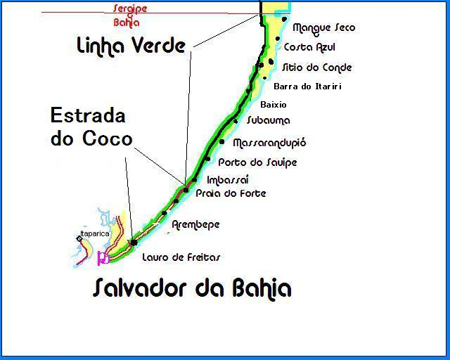 Linha Verde, Bahia, Brasil, Bunks